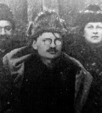 Троцкий в ссылке в Верхоленске Иркутской губернии